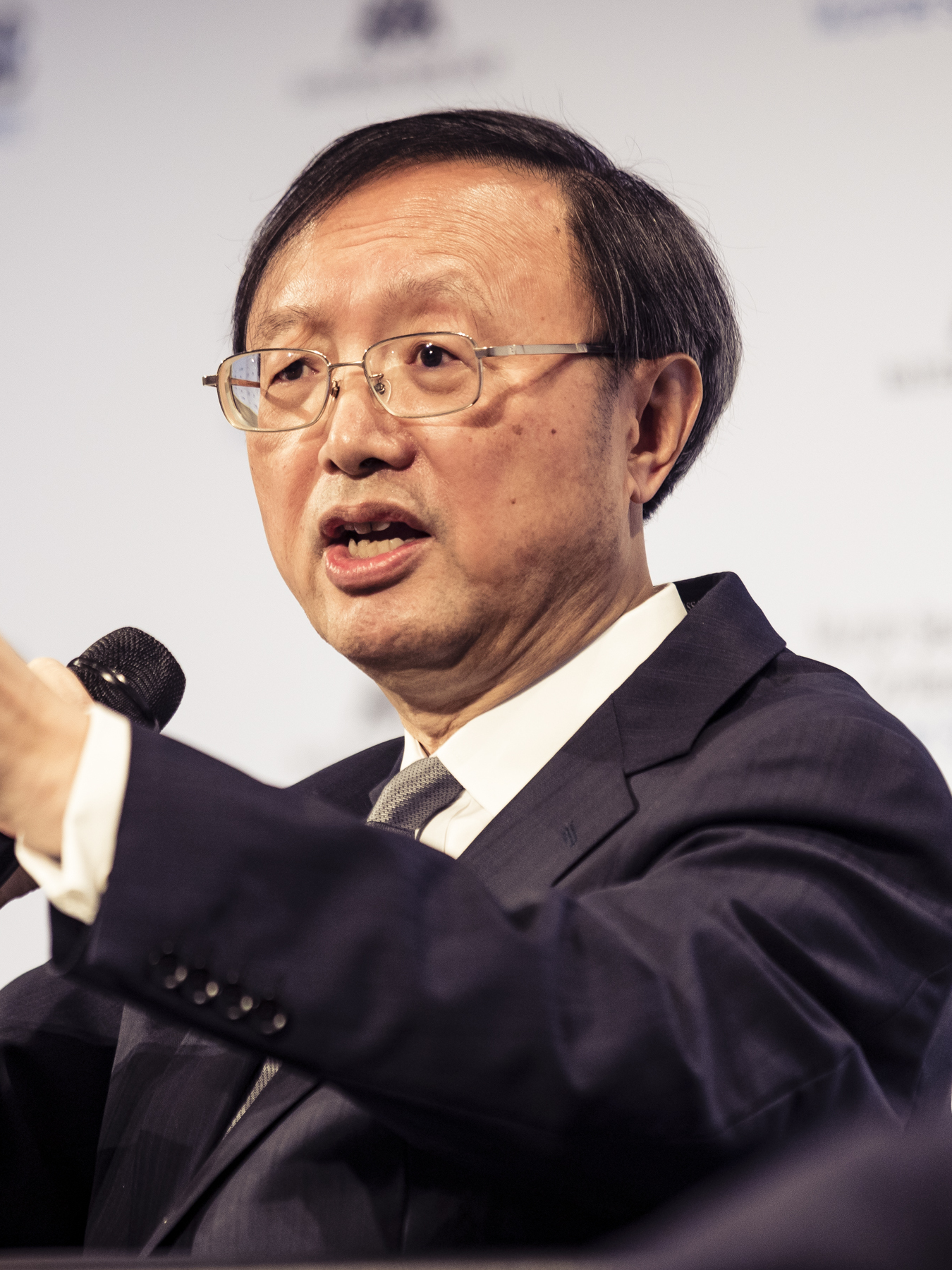 Yang Jiechi während der Münchener Sicherheitskonferenz 2019